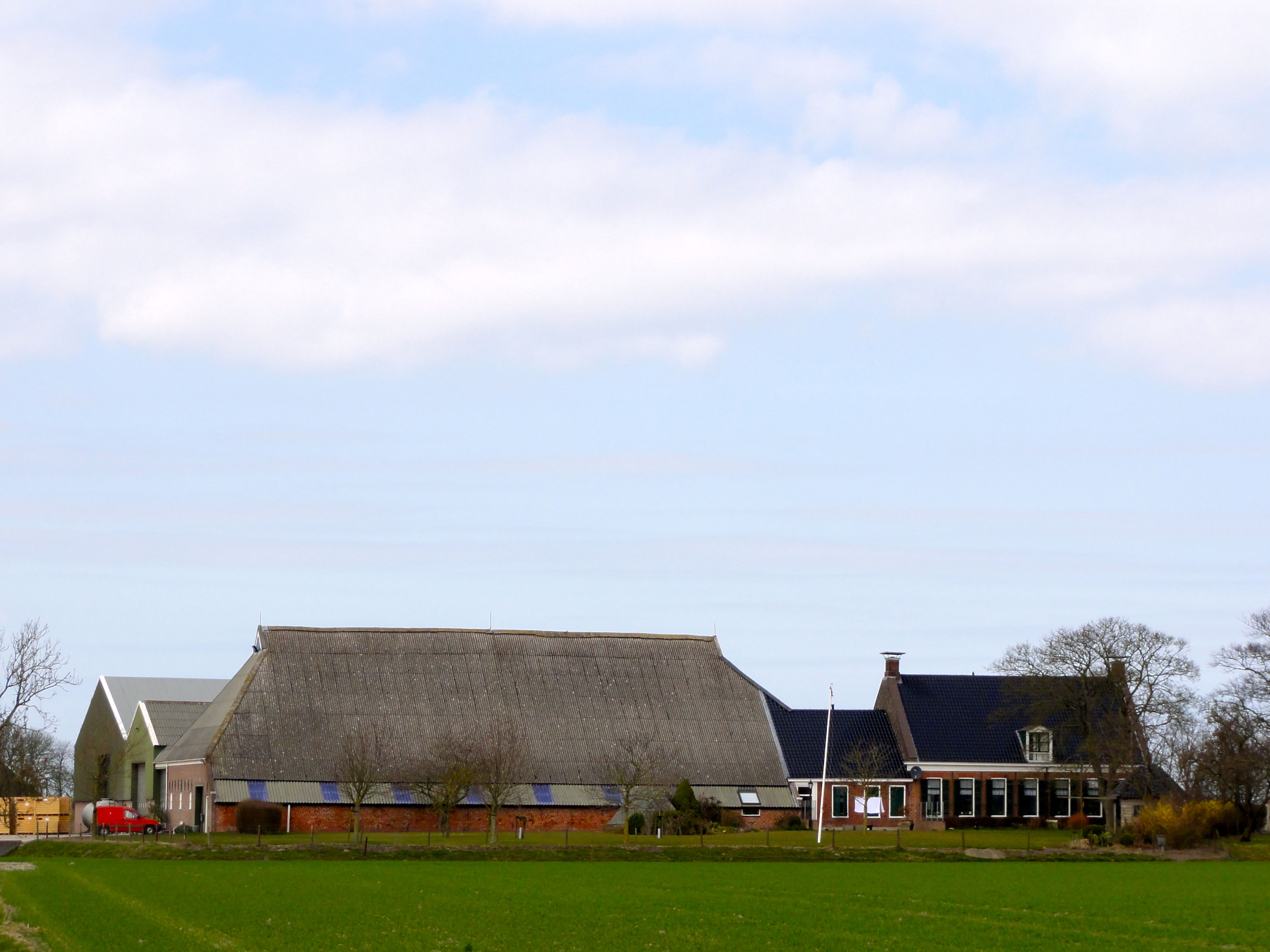 Boerderij Langenhuis nabij Doodstil